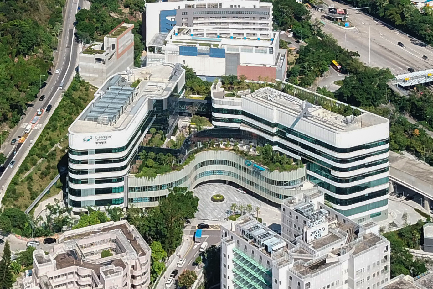 Gleneagles Hong Kong Hospital